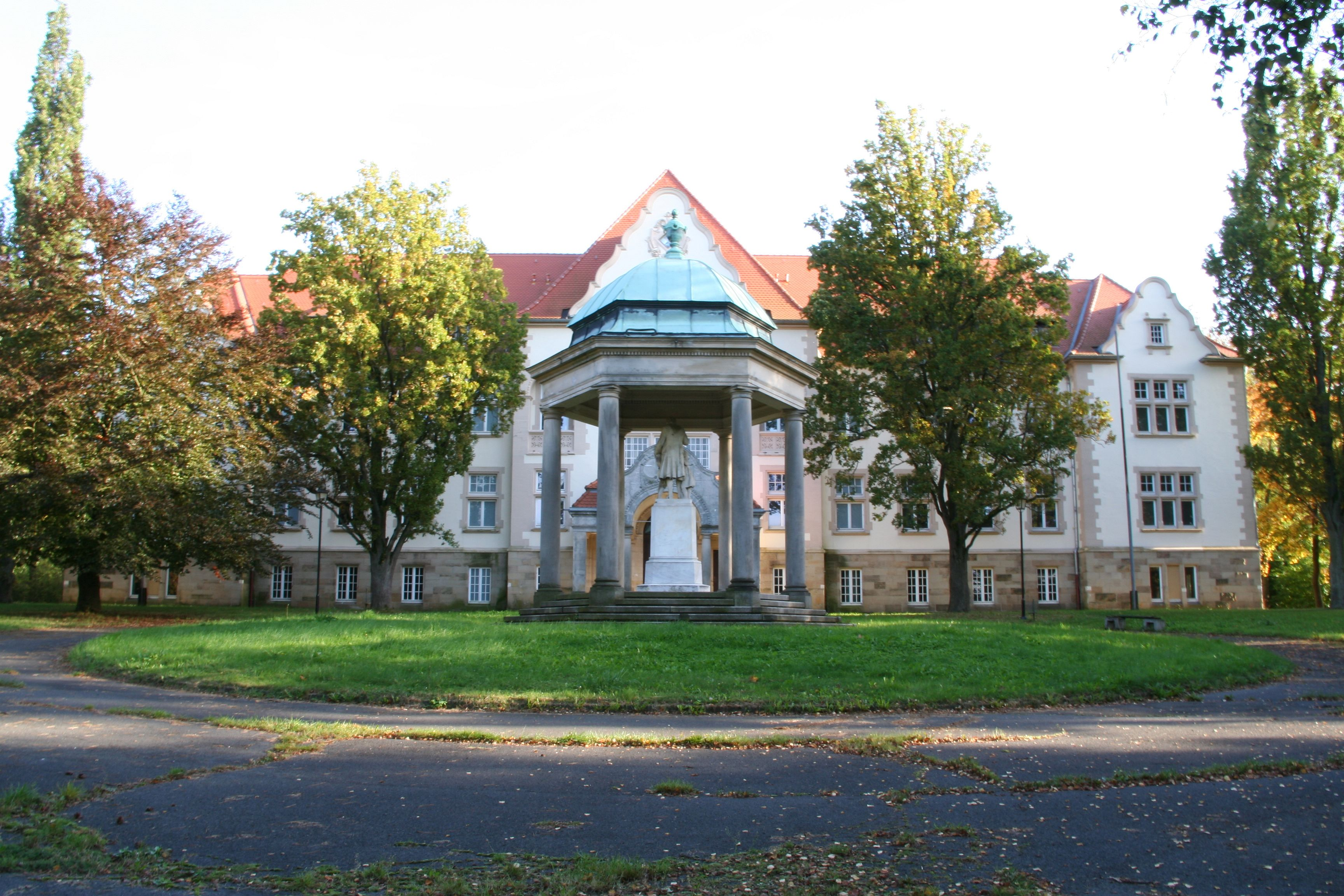 Gebäudekomplex der Jerome Henri Lenoir Stiftung (ehemalige Waisenhäuser) in Fürstenhagen, Hessisch Lichtenau. – Als das Foto gemacht wurde stand das Gebäude leer.